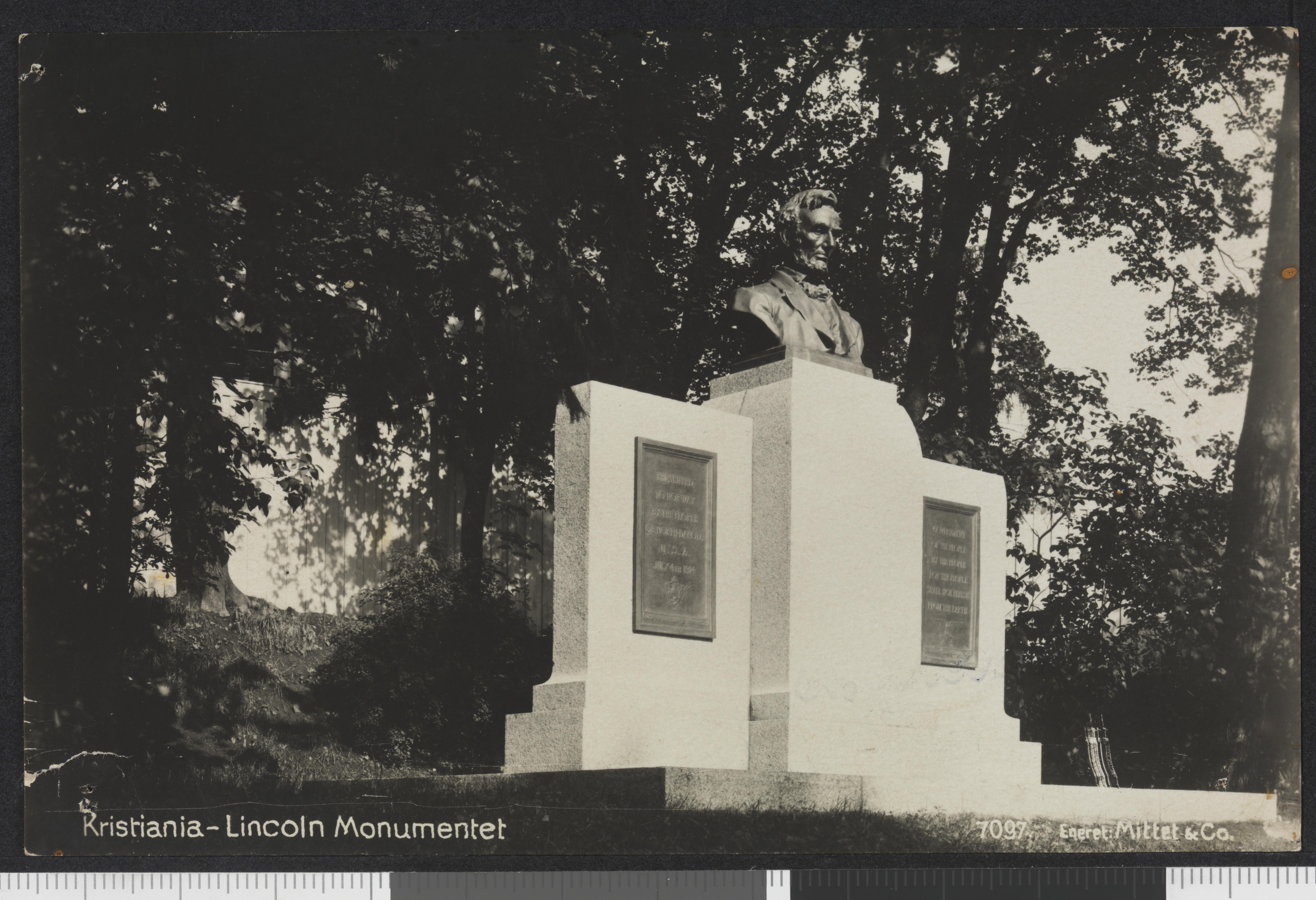 Bildet er hentet fra Nasjonalbibliotekets bildesamling Frognerparken, Oslo, Oslo